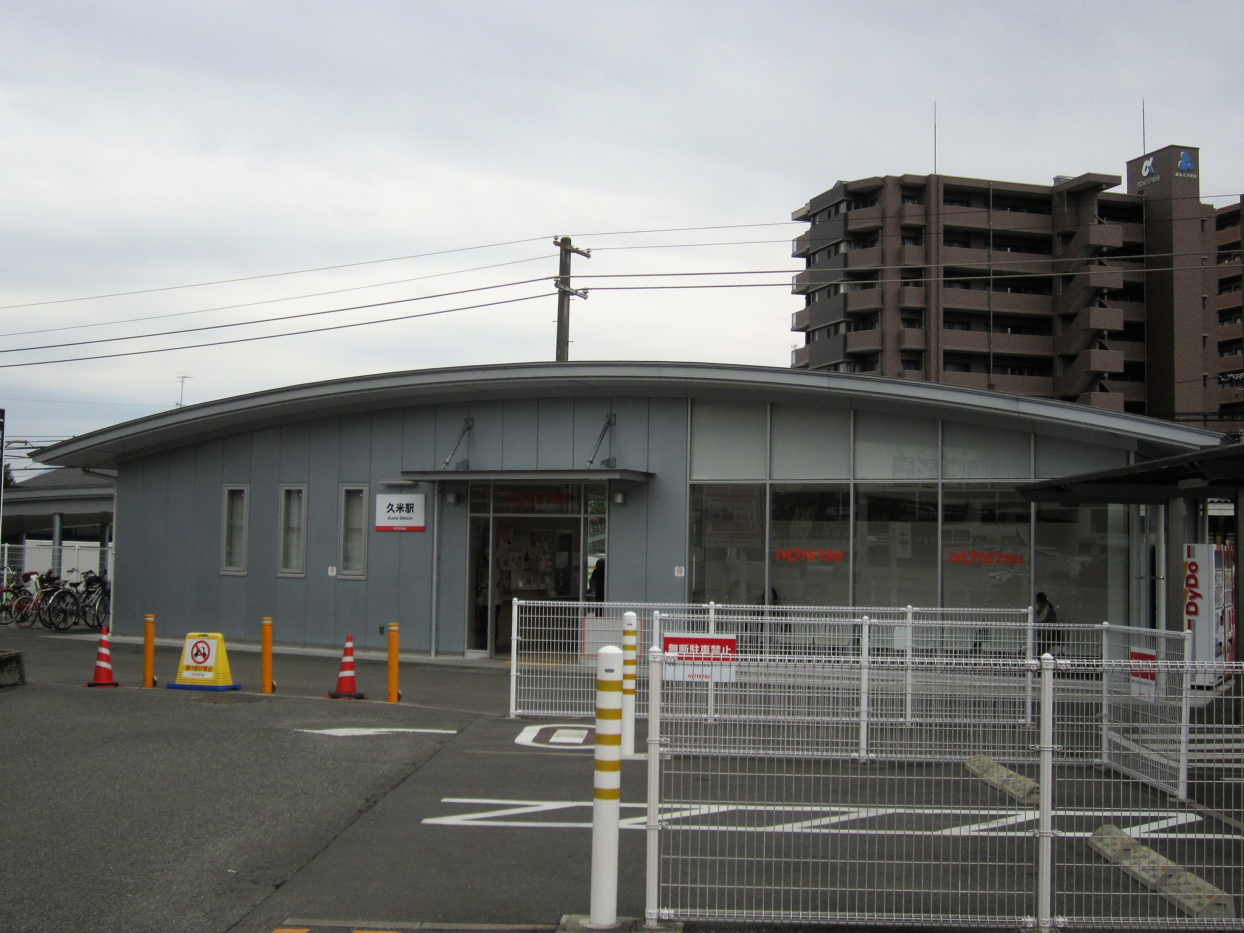 伊予鉄道久米駅（2019年12月）